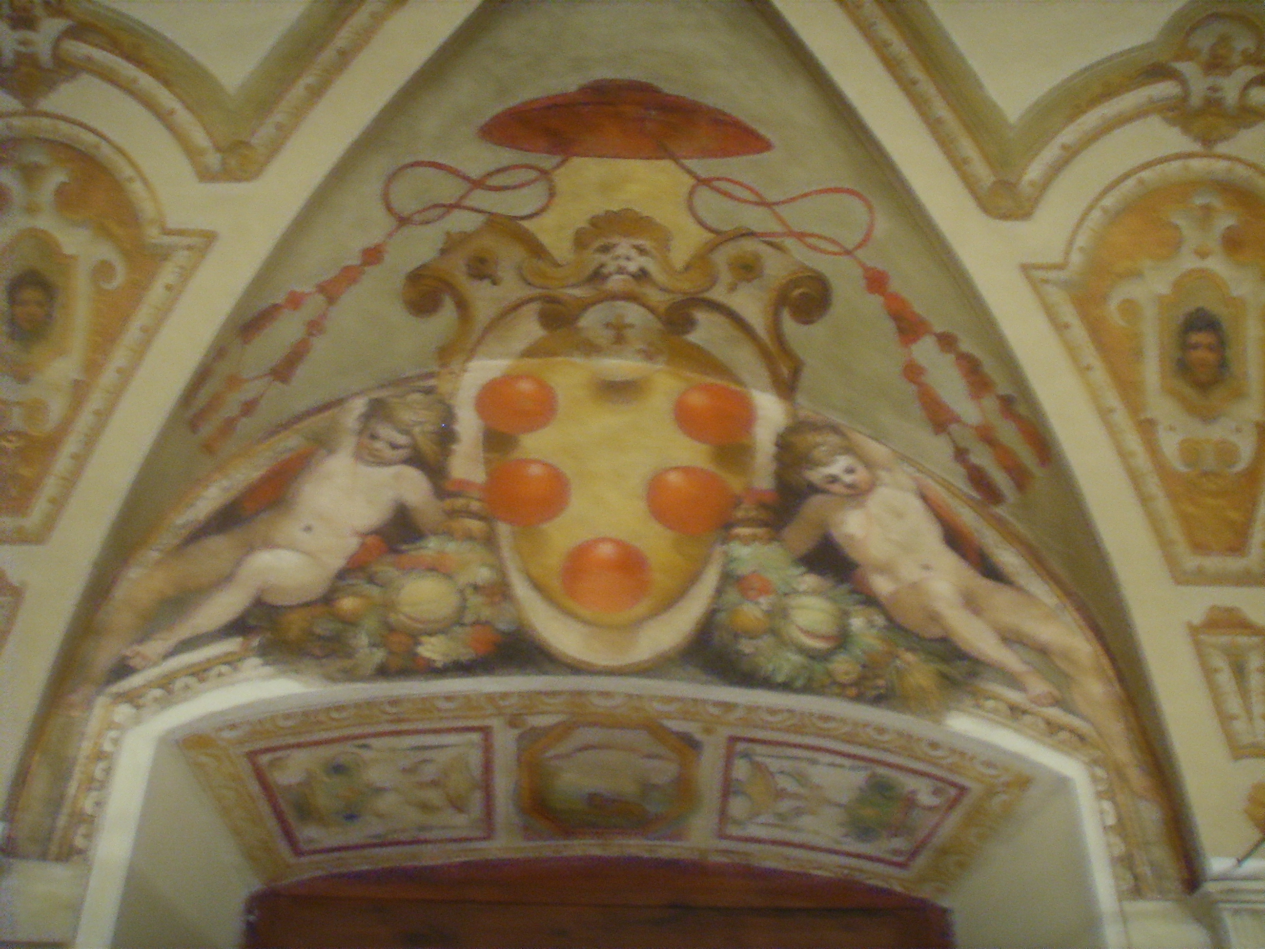 Affresco con lo stemma dei Medici nella Villa medicea di Careggi a Firenze.